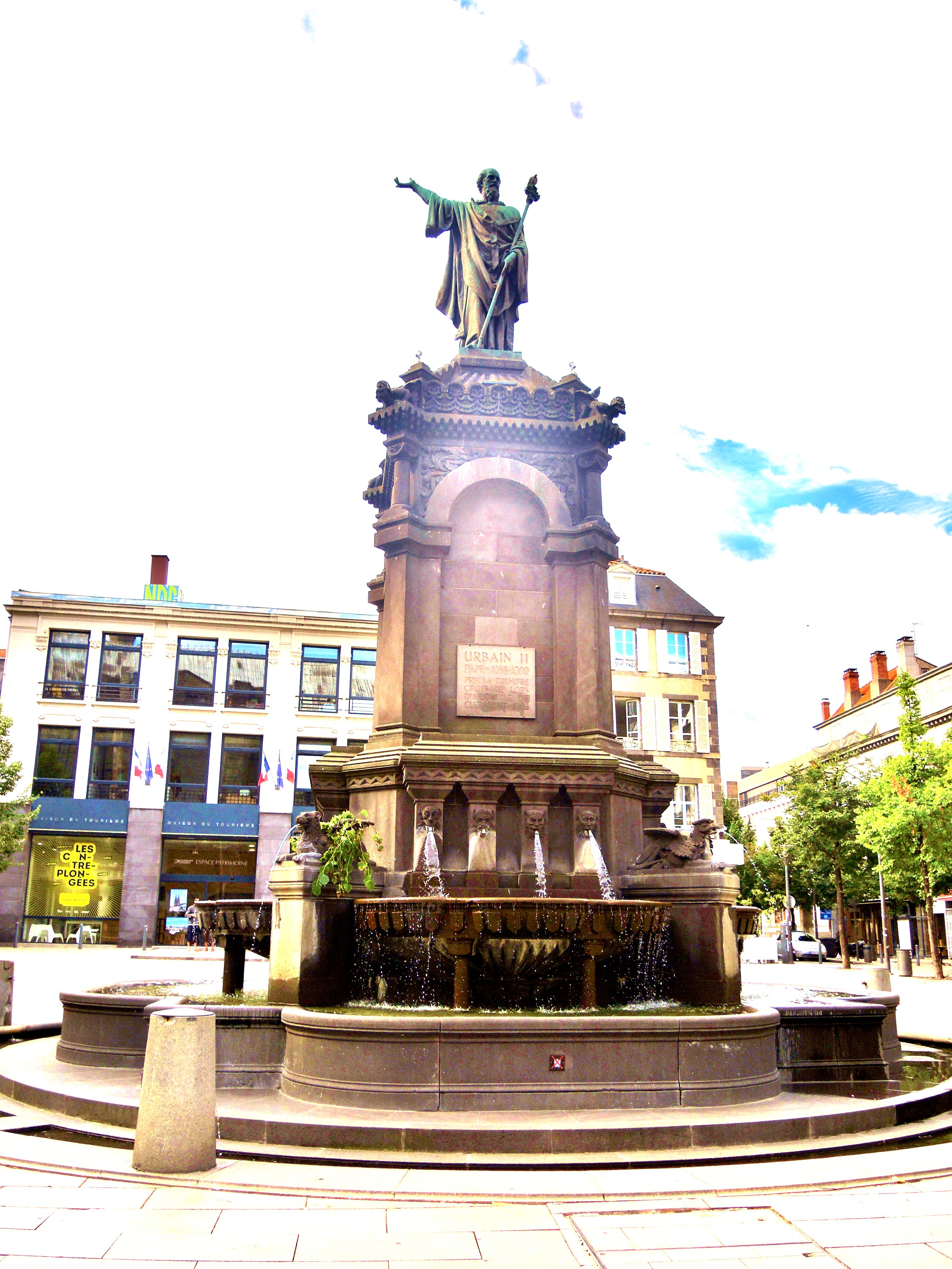 Fontaine d'Urbain II, à Clermont-Ferrand. Puy-de-Dôme